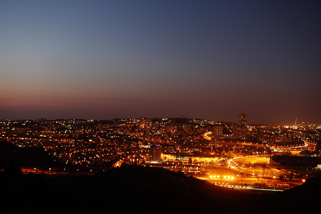 אורות ירושלים משכונת גילה Jerusalem